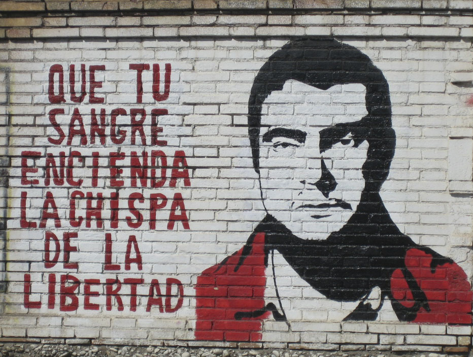 Agustín Rueda